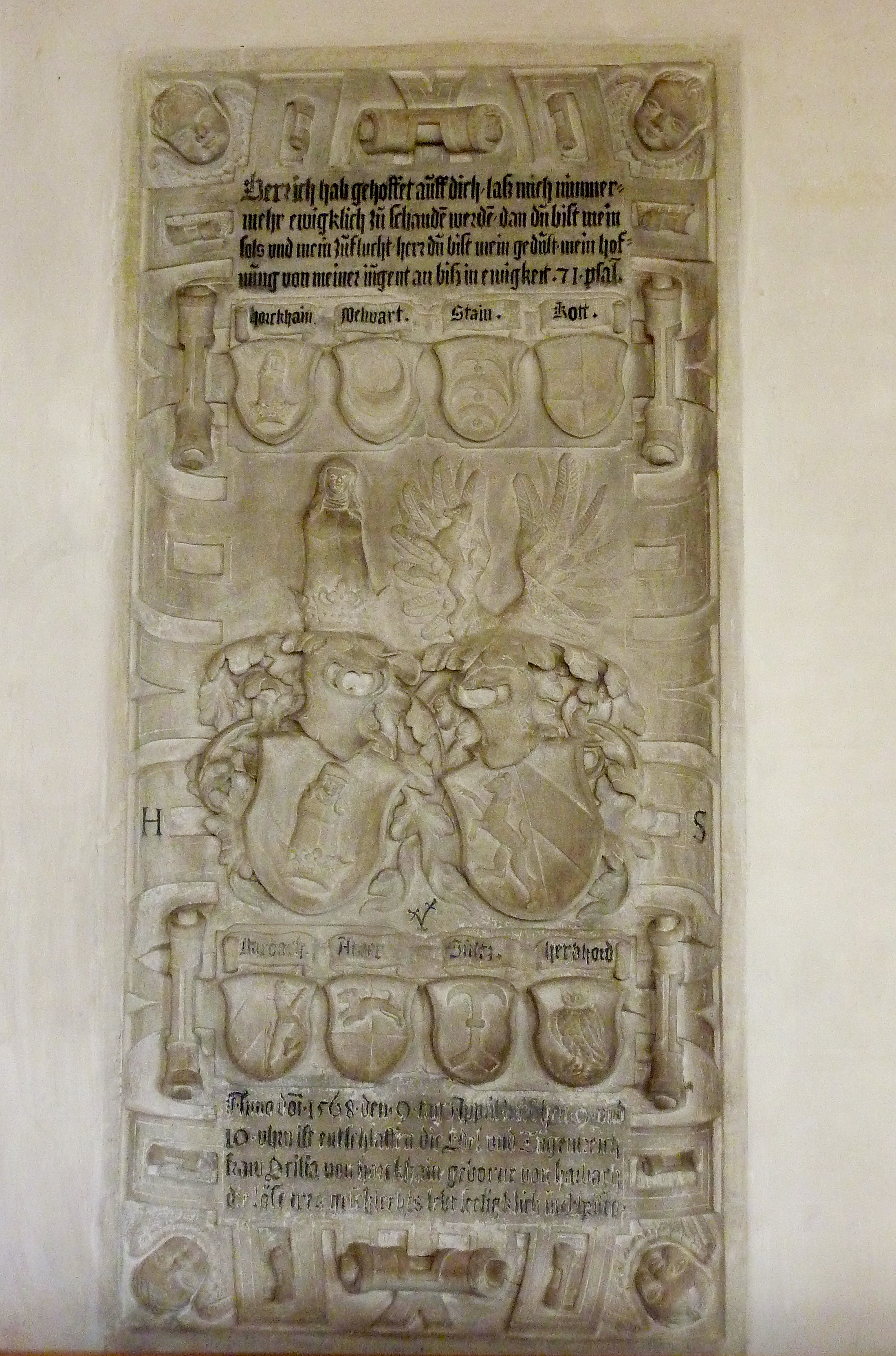 Evangelisch-lutherische Dreifaltigkeitskirche in Haunsheim, einer Gemeinde im Landkreis Dillingen an der Donau (Bayern), Grabstein für Ottilia von Horkheim, gest. 1568, von H. Schaller (Ulm), unter der Empore